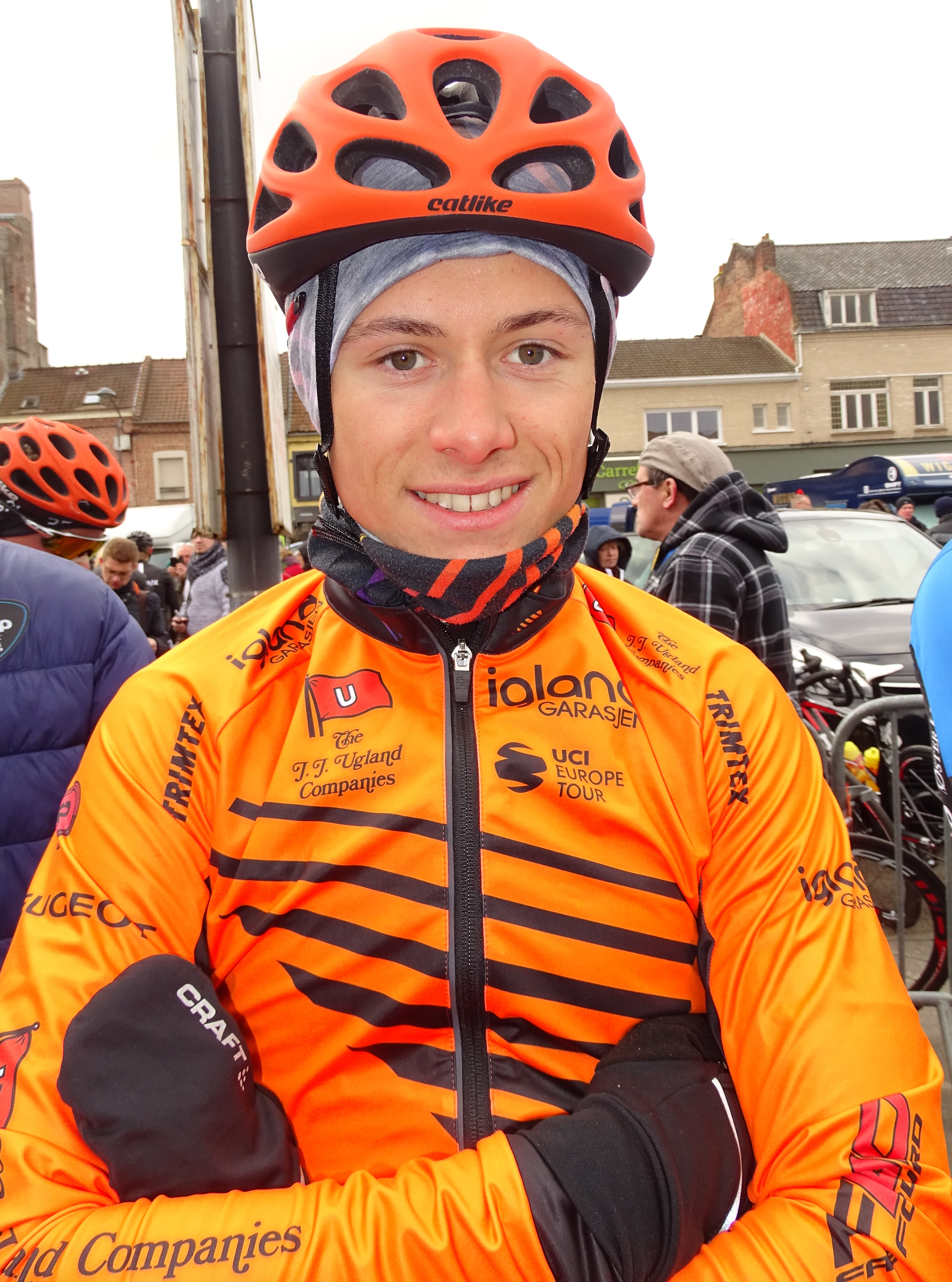 Reportage réalisé le dimanche 6 mars à l'occasion du départ et de l'arrivée du Grand Prix de Lillers-Souvenir Bruno Comini 2016 à Lillers, Pas-de-Calais, Nord-Pas-de-Calais, France.